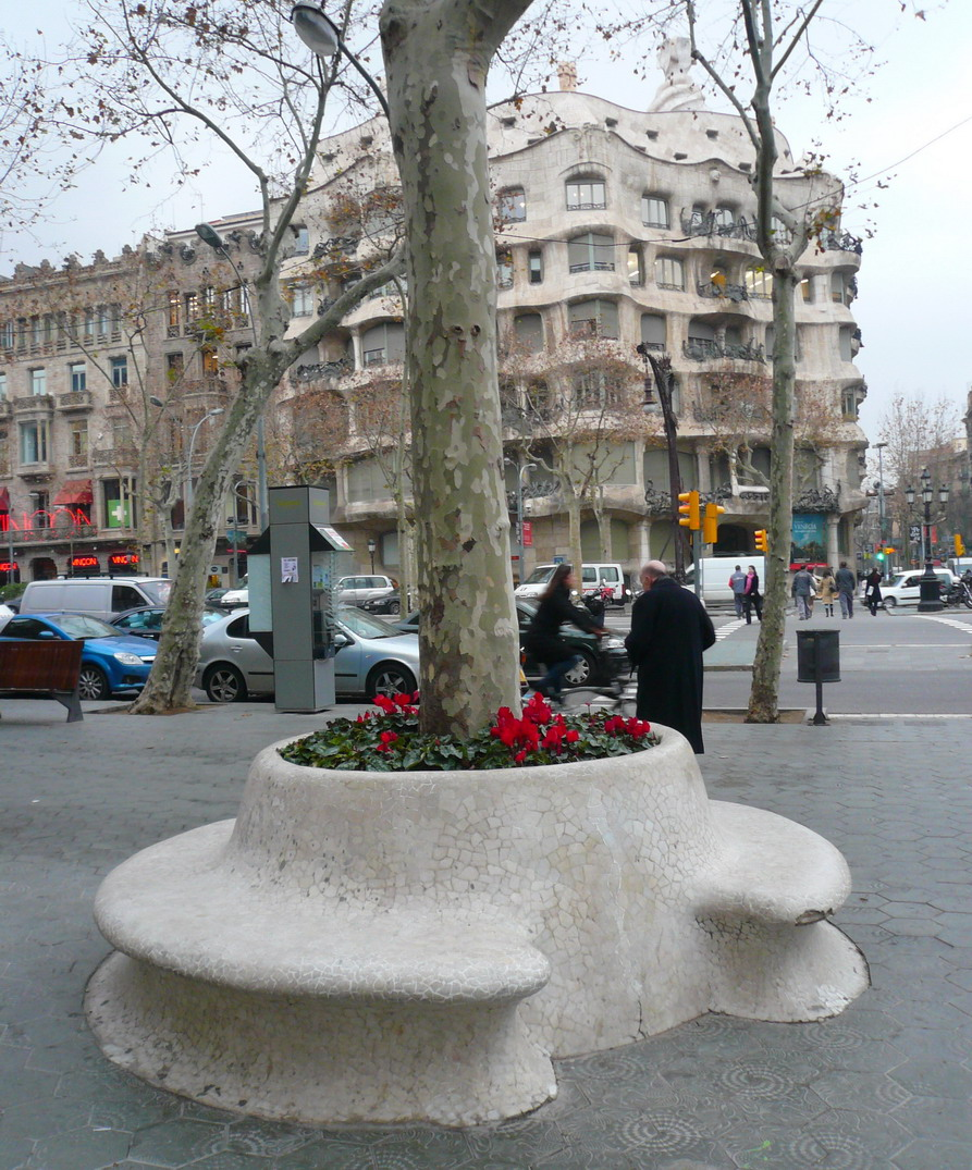 Jardineres circulars del passeig de Gràcia, fetes amb trencadís el 1974 a imitació dels bancs-fanals modernistes.